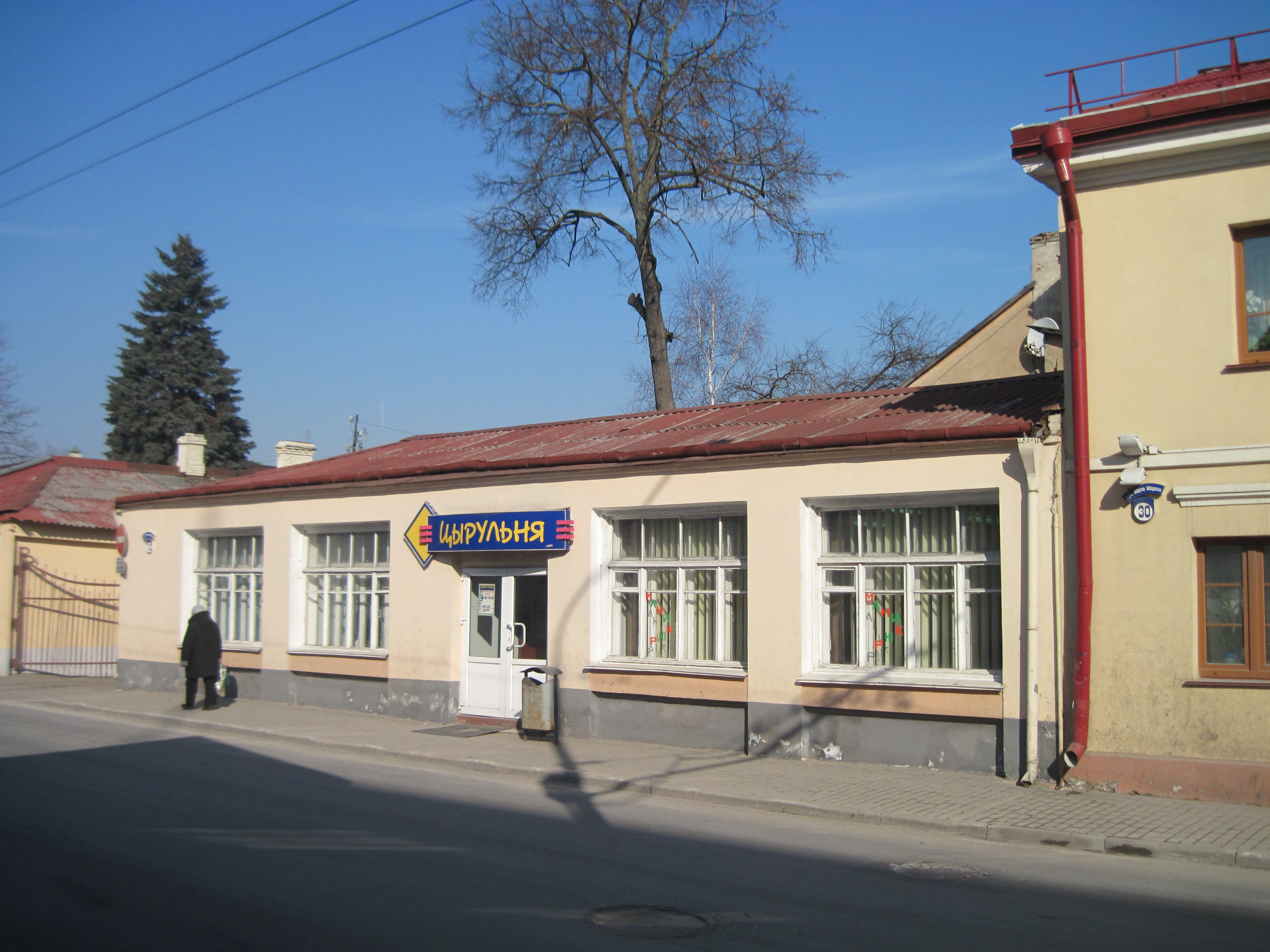 Беларуская (тарашкевіца): Забудова гістарычнага цэнтра Гродна. Вуліца К. Маркса, 28